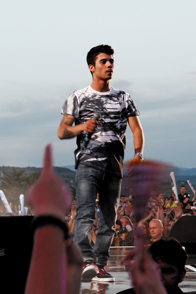 Moreno agli MTV Music Awards di Firenze nel 2013